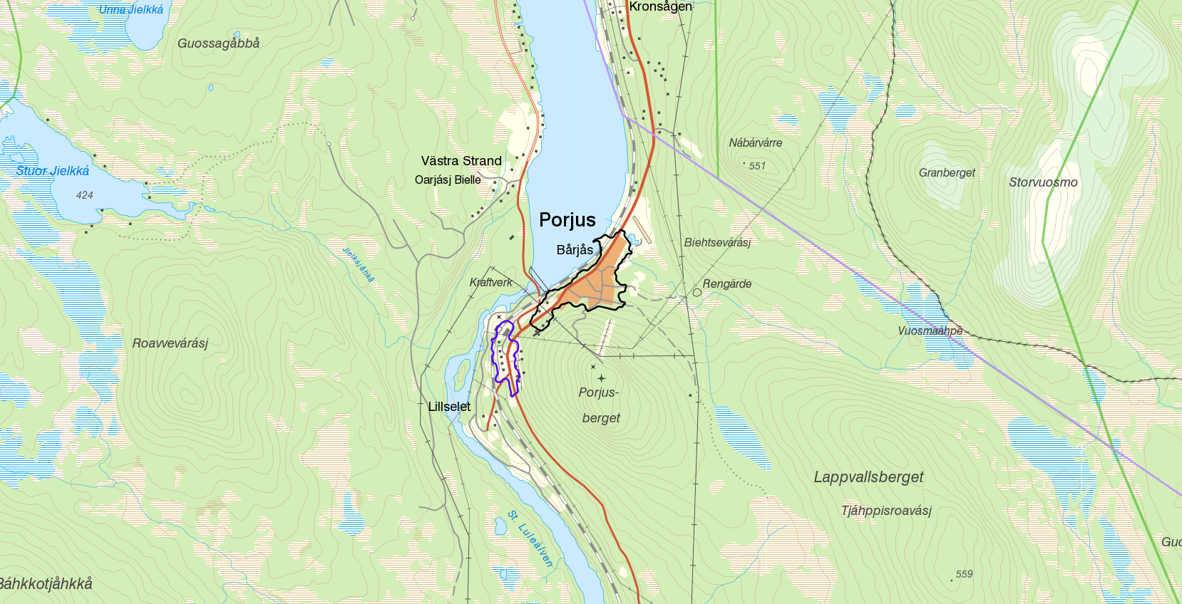 Tätorten (svarta gränser) och småorten (lila gränser) i Porjus vid tätorts- och småortsavgränsningen 2015. Bakgrundskarta från Lantmäteriet, skala 1:30 236.